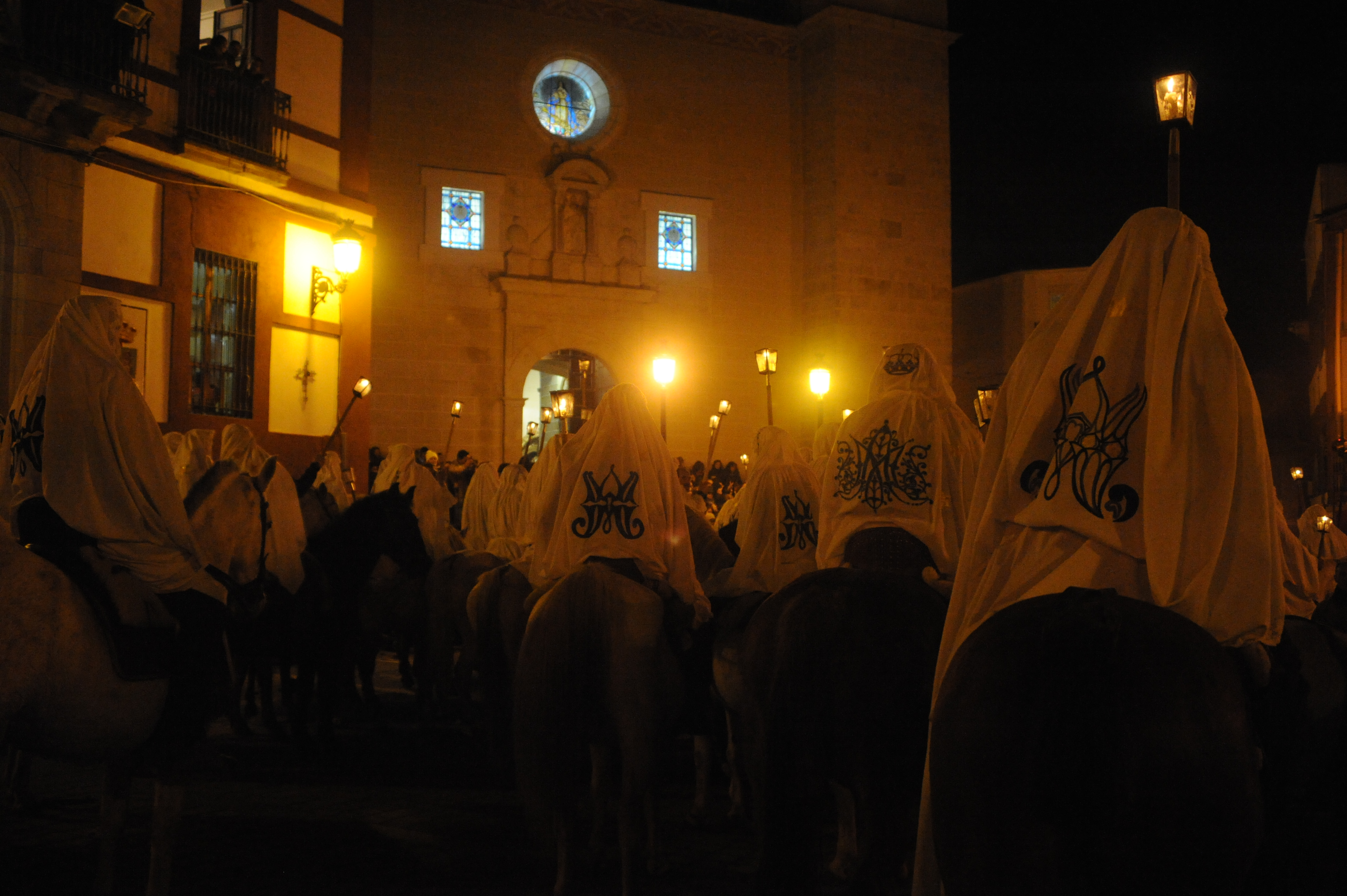 Fiesta de la Encamisá en Torrejoncillo (Cáceres)